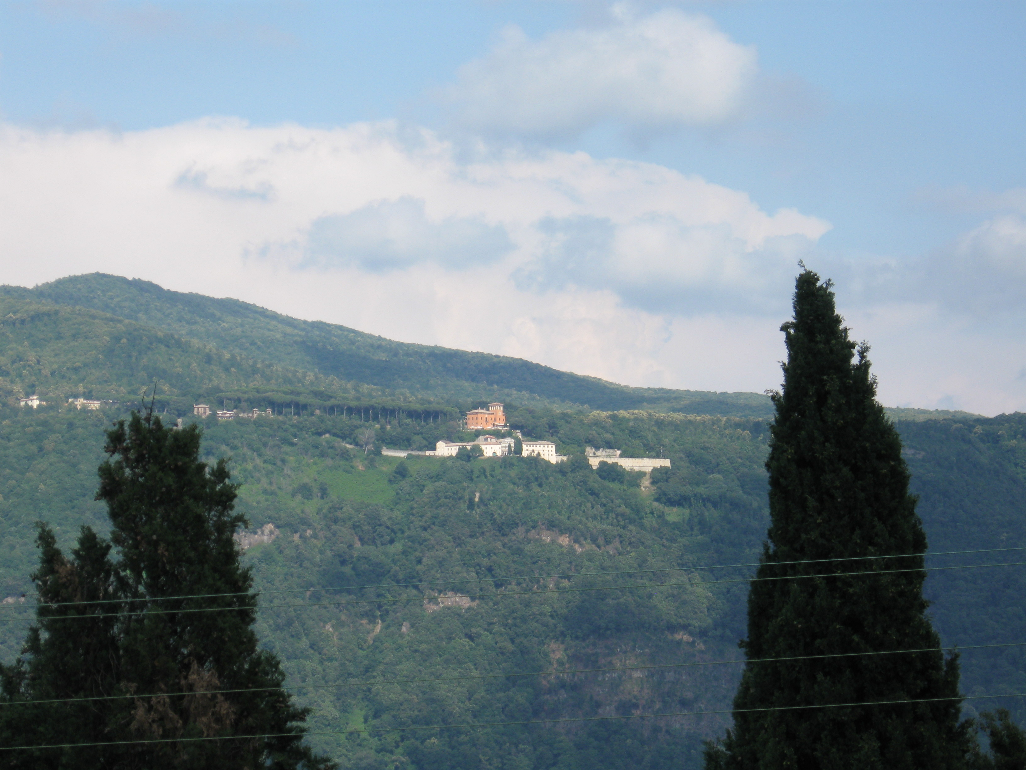 Palazzolo